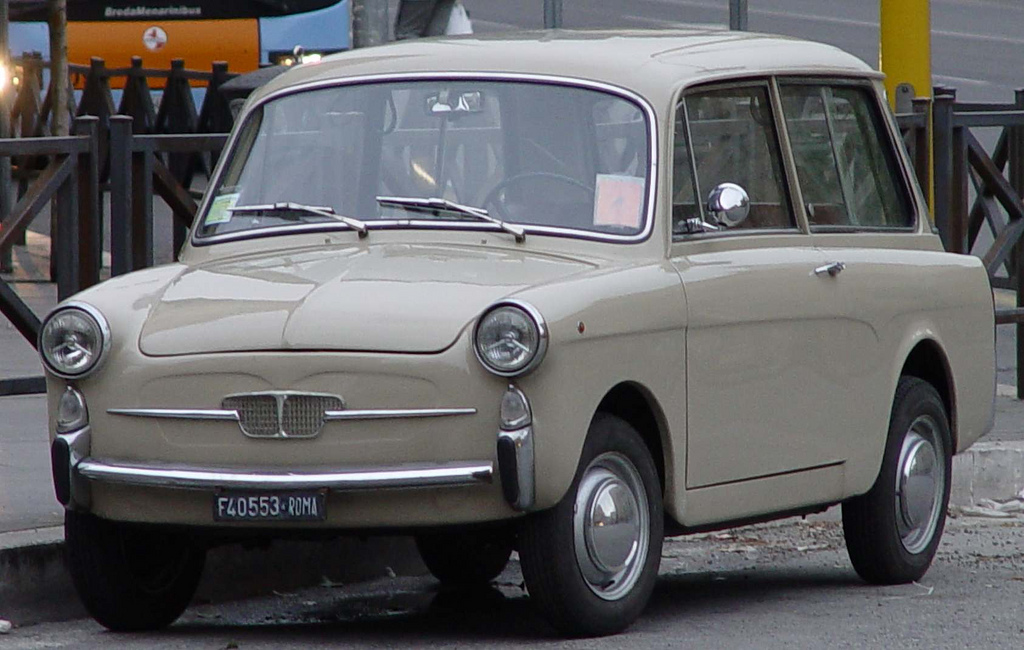 rifacimento del modello Fiat 500 familiare (Autobianchi elaborava nuove carrozzerie per alcuni modelli Fiat). Certo il concetto di "familiare" è forzato, ma per quel tempo...